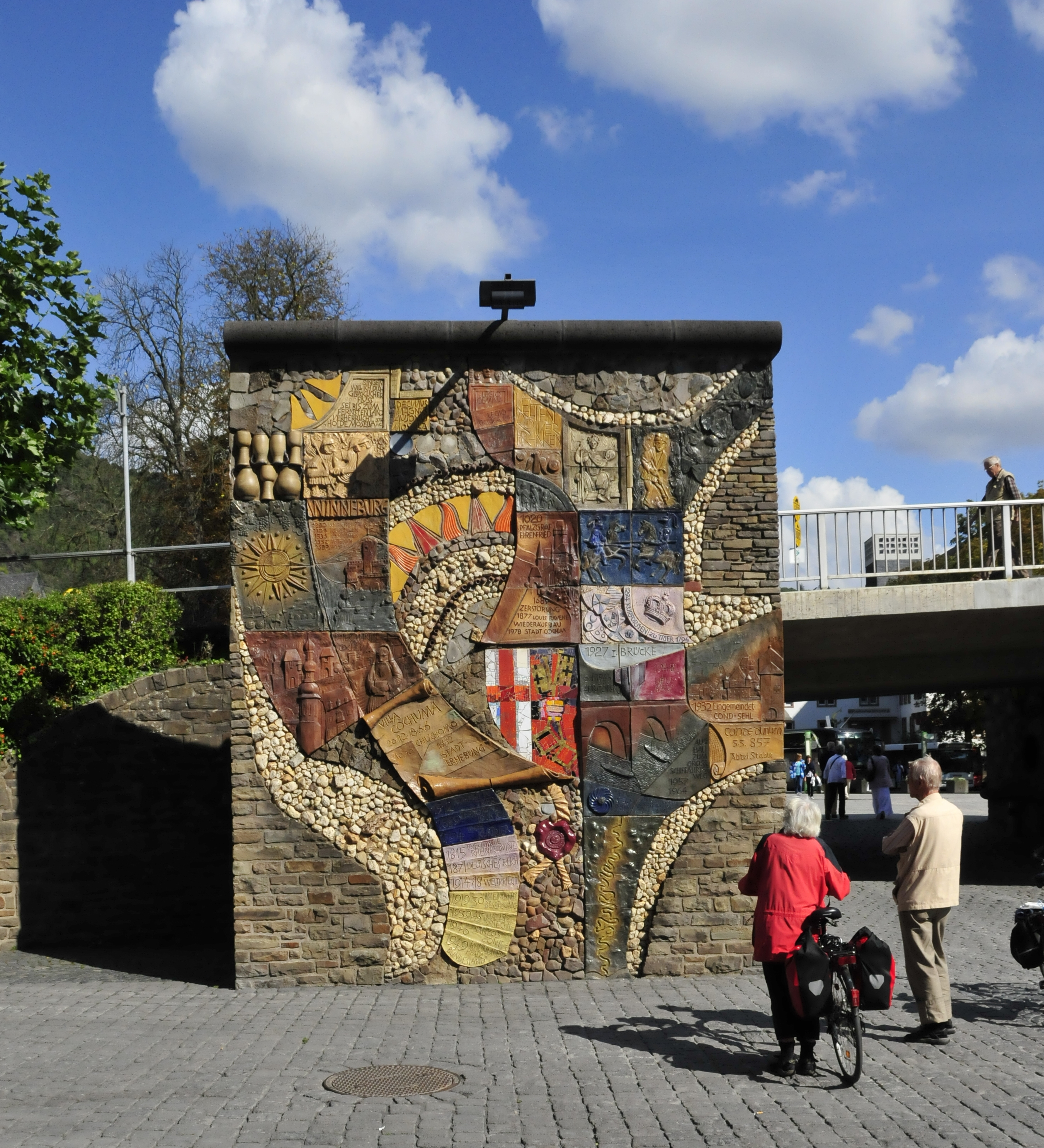 Cochem, Mosaikwand mit Geschichtszahlen